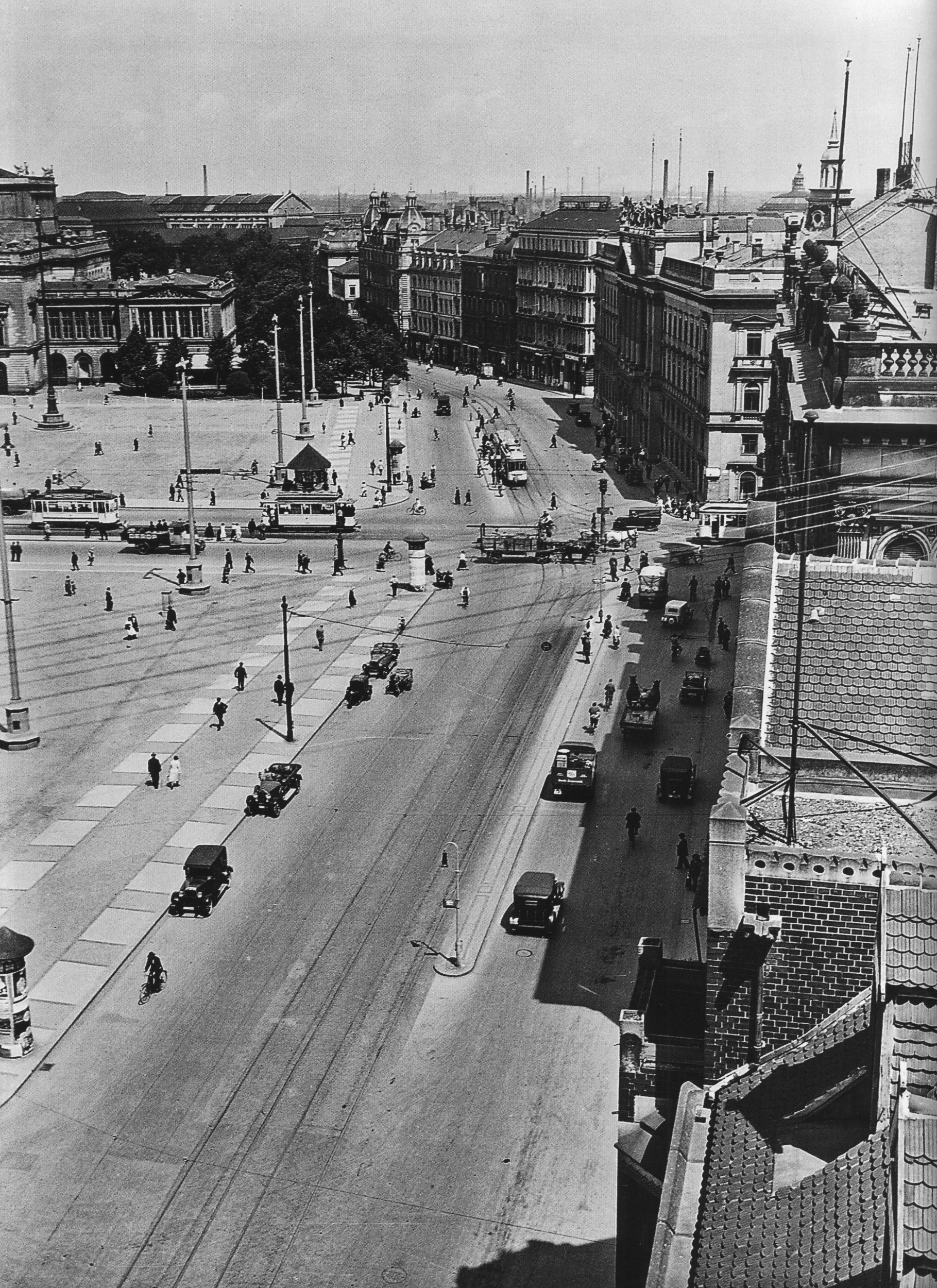 Ansicht des Georgiringes und des Augustusplatzes vom Europahaus aus.